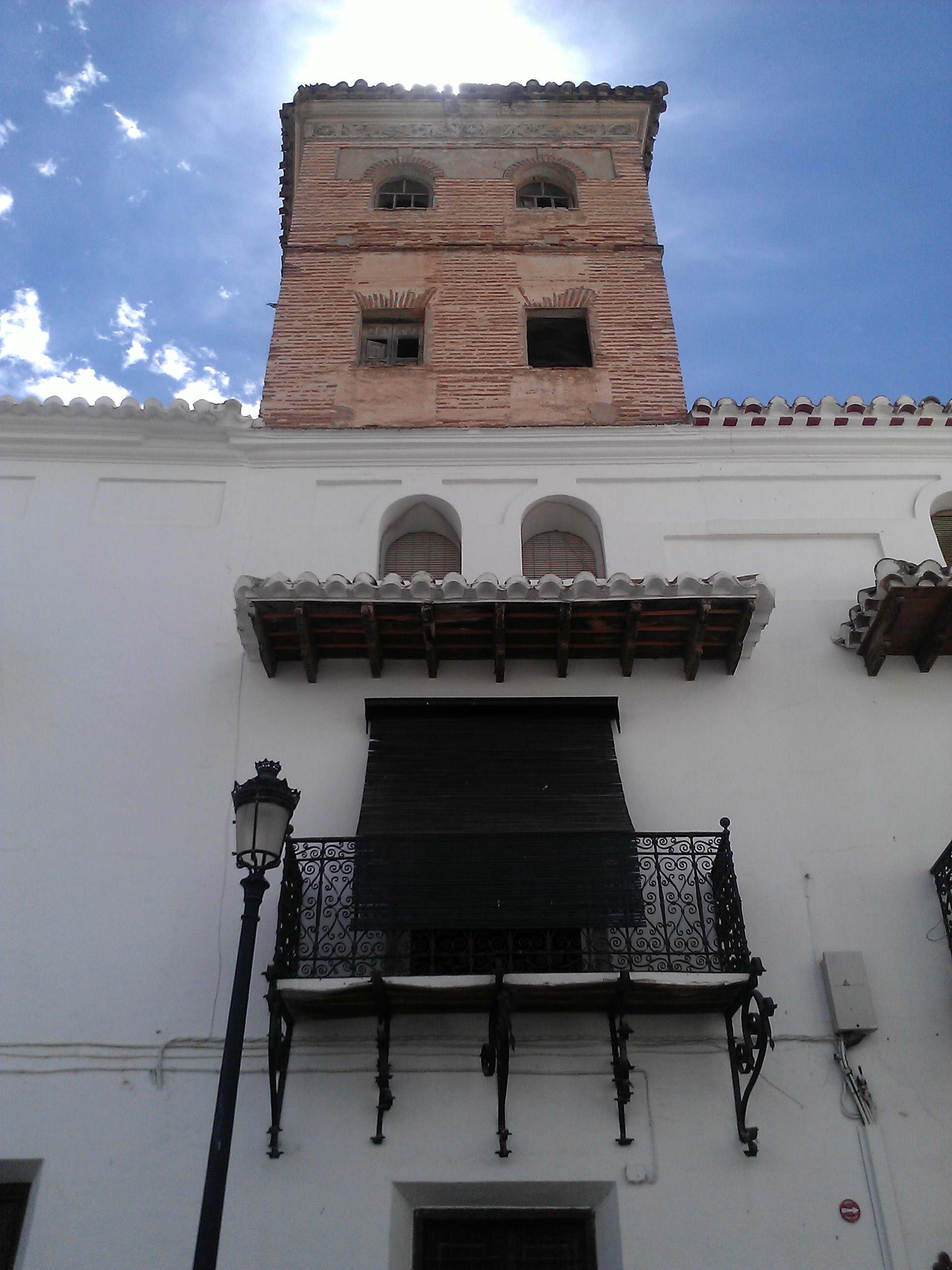 Localidad de Orce